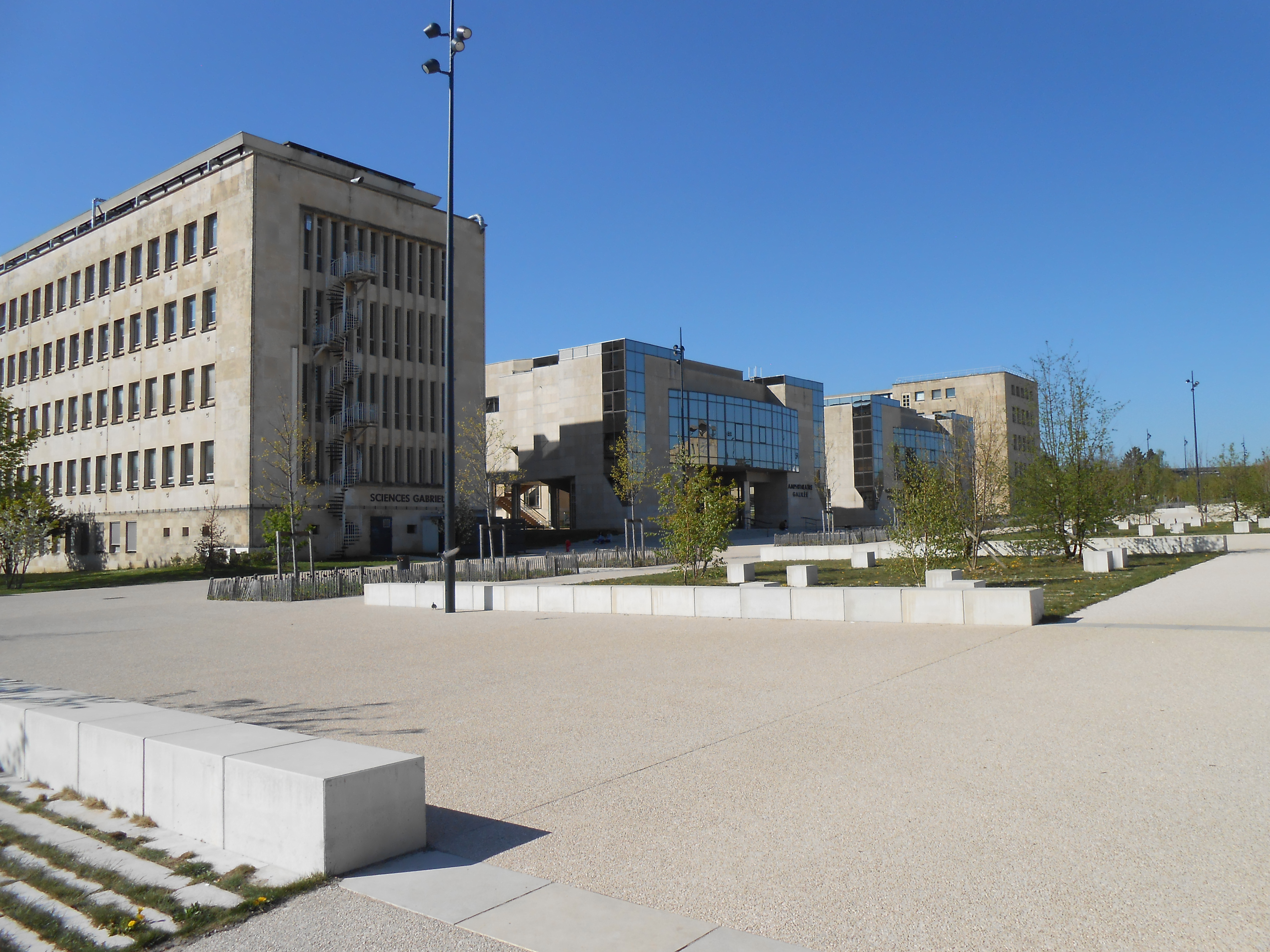 Vue depuis l'esplanade Erasme